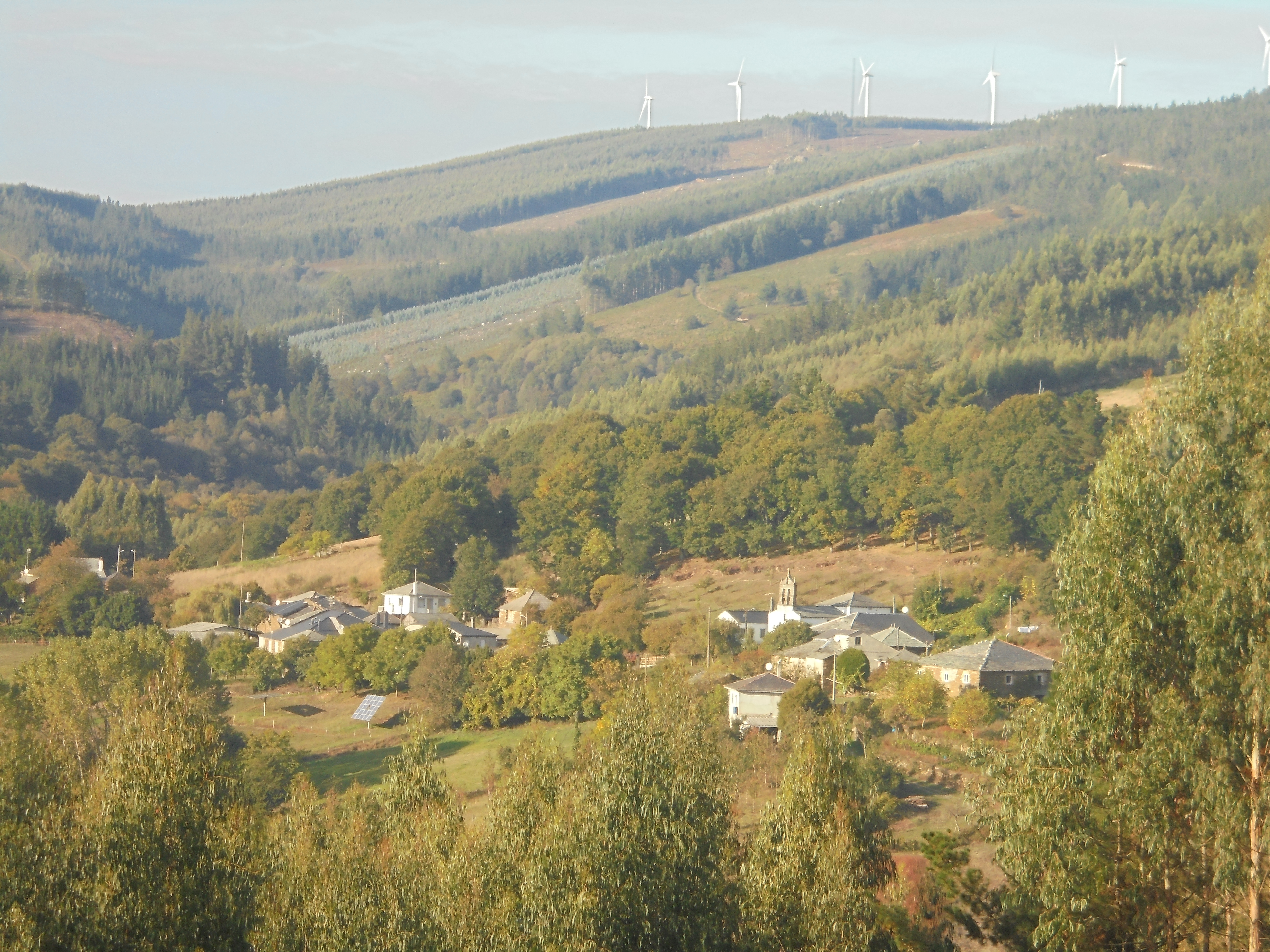 Vista de San Martín de Lúa ( Pol)